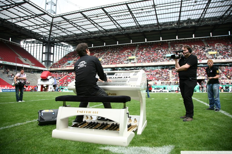 Robert Bartha live vor 25.000 Zuschauern im Rhein Energie Stadion Köln